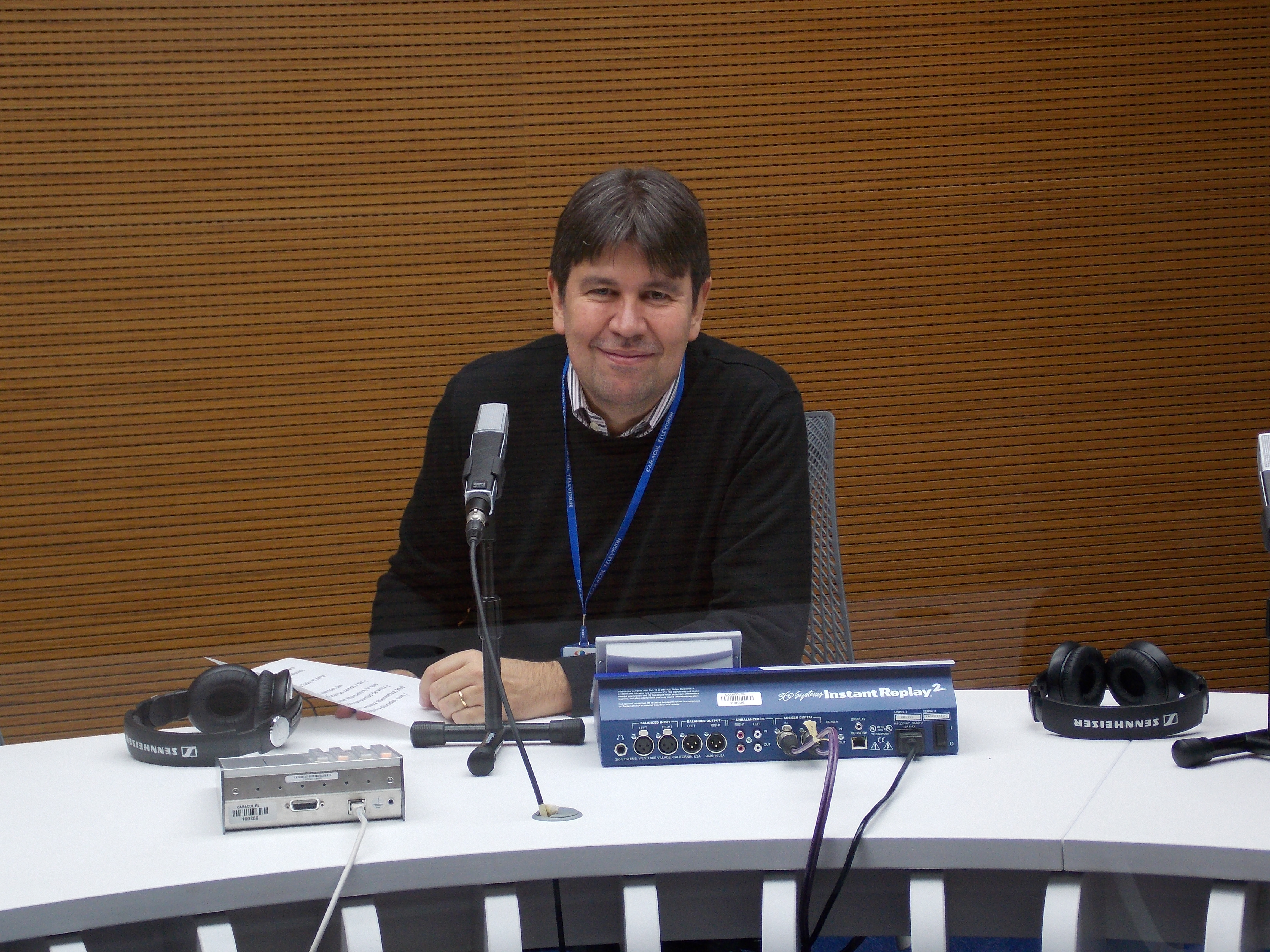 Image showing Oscar "Tito" López at his workplace.